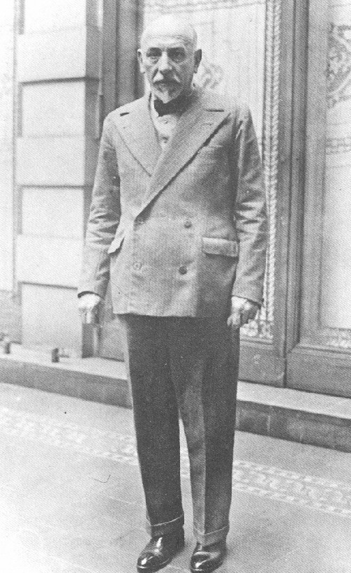 Luigi Pirandello a Berlino.